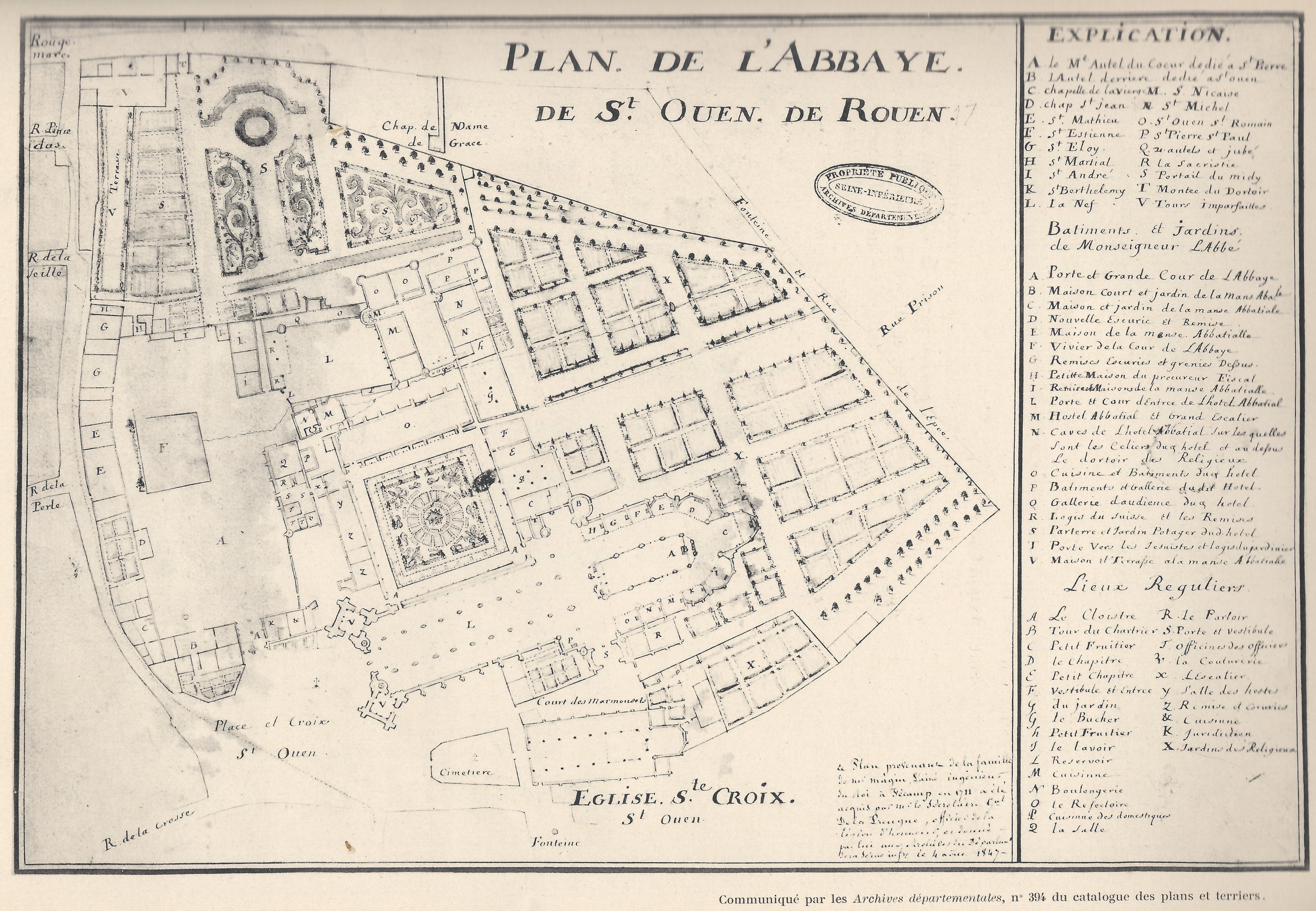 Plan de l'abbaye Saint-Ouen de Rouen, réalisé par Magin Lainé, ingénieur du roi à Fécamp en 1711.